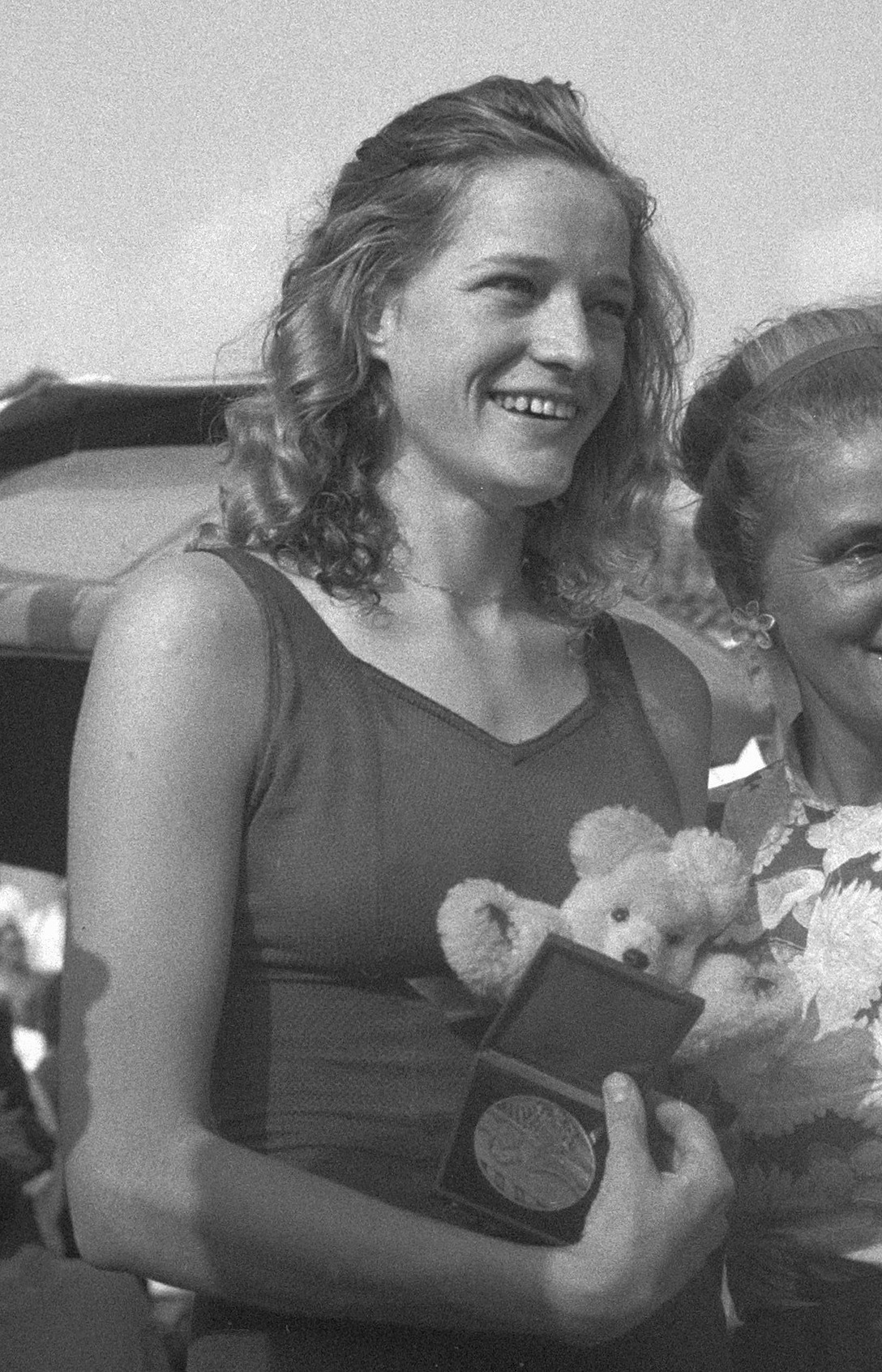 Europese zwemkampioenschappen te Monaco: Zwemster [Karen Harup uit Denemarken] met medaille en mascotte. Zij won de 400 meter vrije slag en 100 meter rugslag